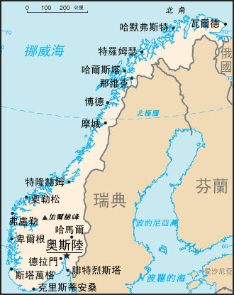 挪威地图